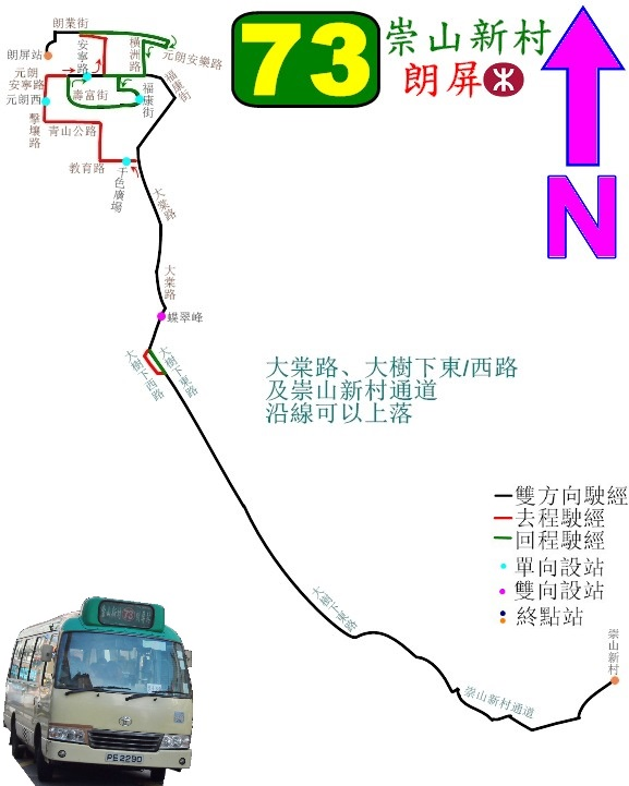 中文（香港）: 新界專線小巴73線的走線圖